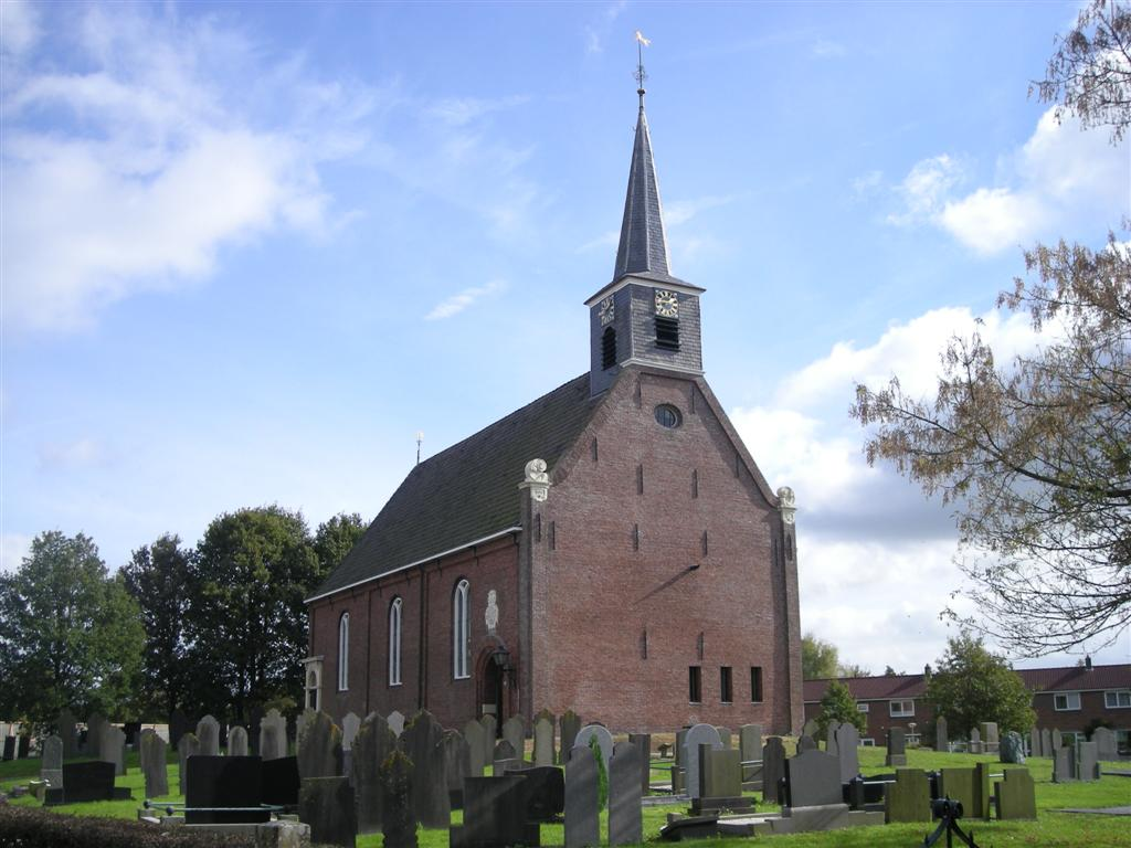 Skoattertsjerke in Oudeschoot (church)